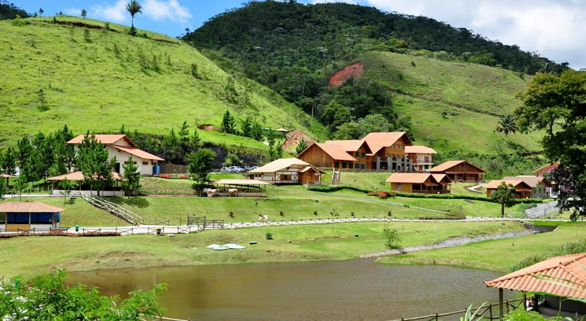 Hotel-Fazenda na região do Rio de Janeiro